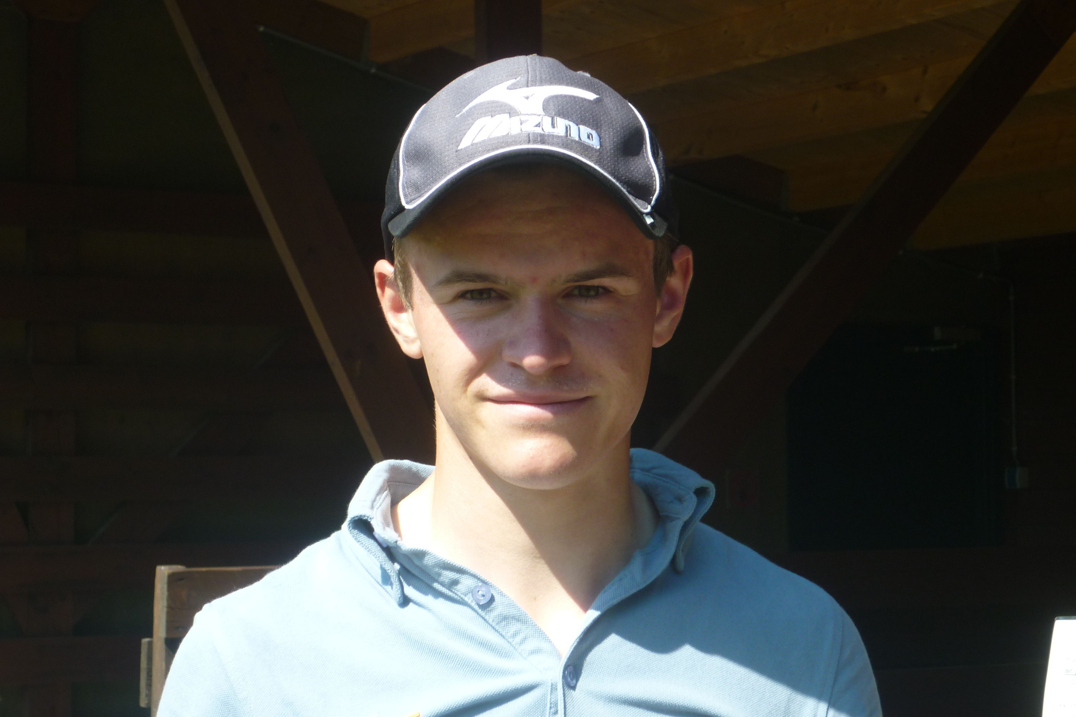 Daan Huizing, winnaar Nationaal Open 2012